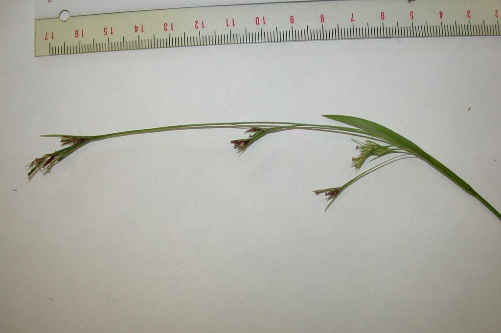 コシンジュガヤ （シンジュガヤ属：カヤツリグサ科） 2003.10.01 日本、和歌山県白浜町 Shirahama t. Wakayama pref. Japan.